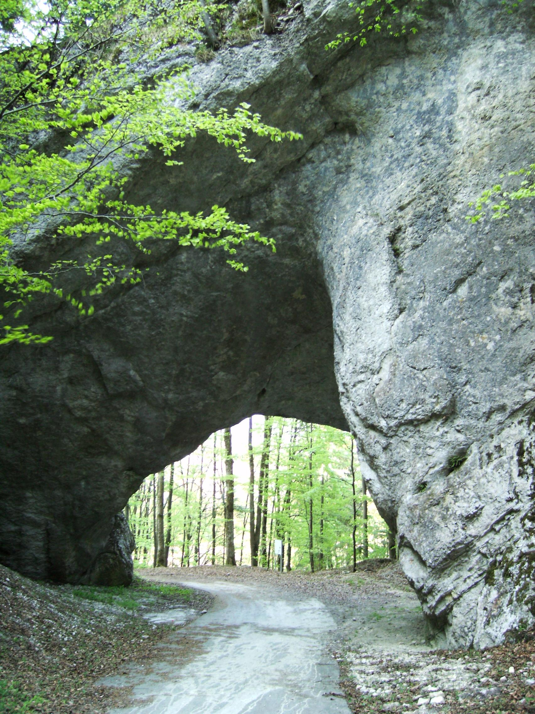 Col de Pierre Pertuis (Massif du Jura côté Suisse). Passage de l'ancienne voie par la pierre percée.